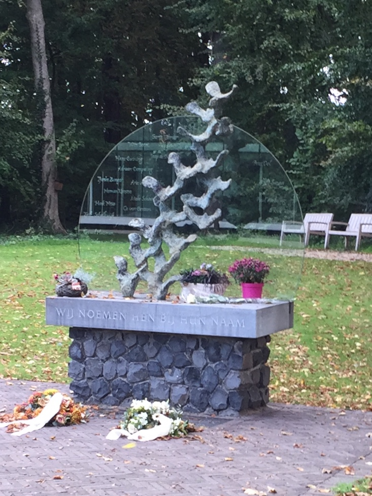 Gedenkteken ter herinnering aan de 32 slachtoffers van het neerstorten op 25 september 1996 van een DC-3 in de Waddenzee tijdens een personeelsuitje van Provinciale Waterstaat van Noord-Holland.